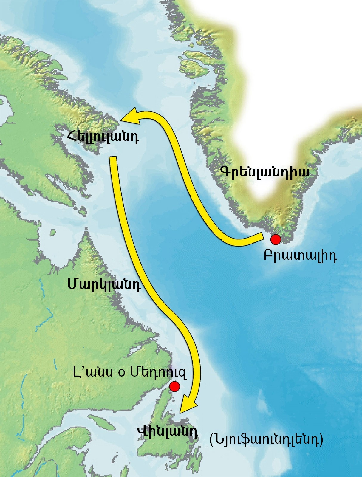 Վինլանդի ճանապարհորդության քարտեզը